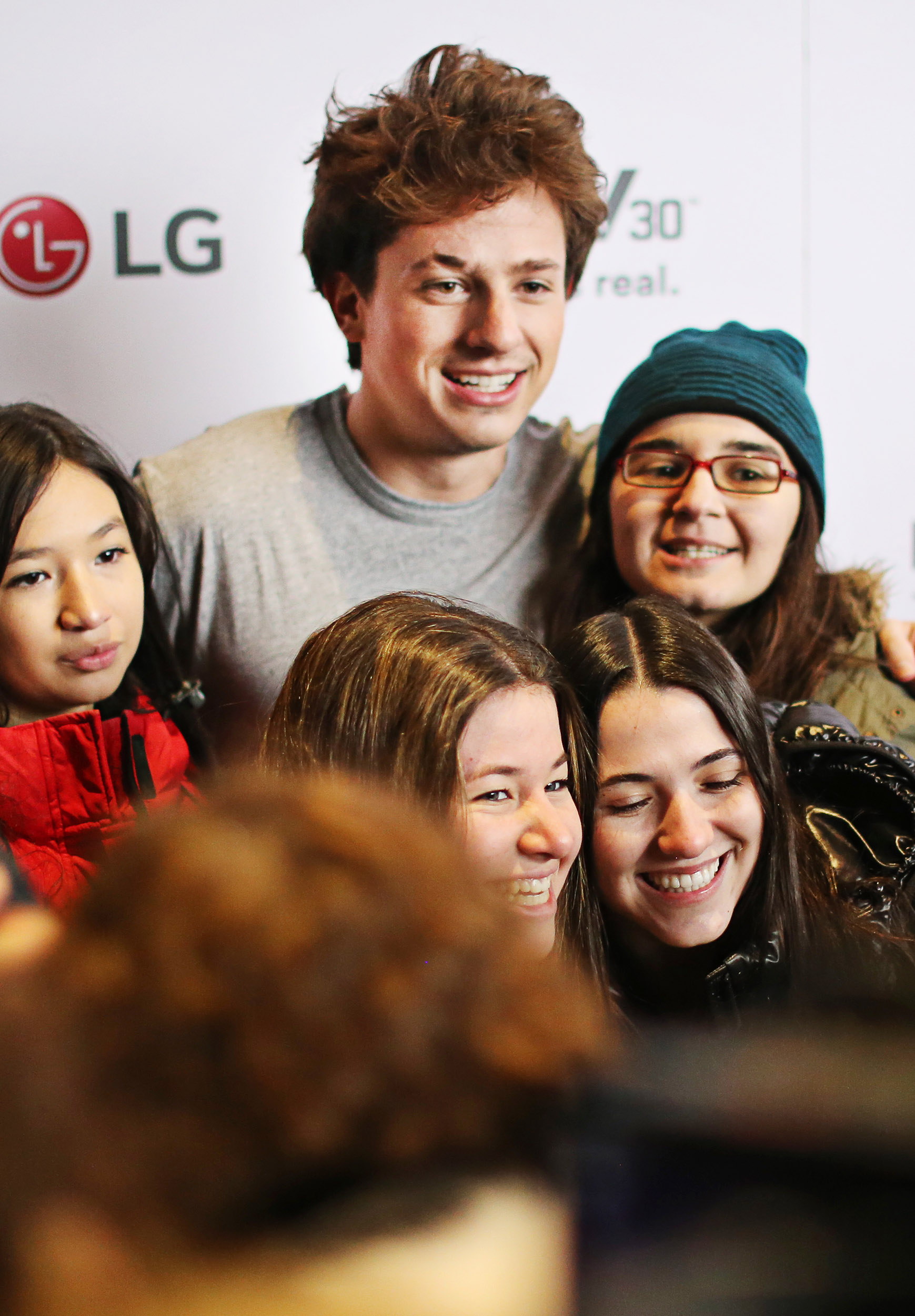 10일 미국 뉴욕에서 열린 LG V30 체험 행사 '디스 이즈 리얼' 행사를 방문한 관람객들이 때맞춰 방문한 인기 팝가수 찰리 푸스(Charlie Puth)와 즐거운 시간을 보내고 있다.